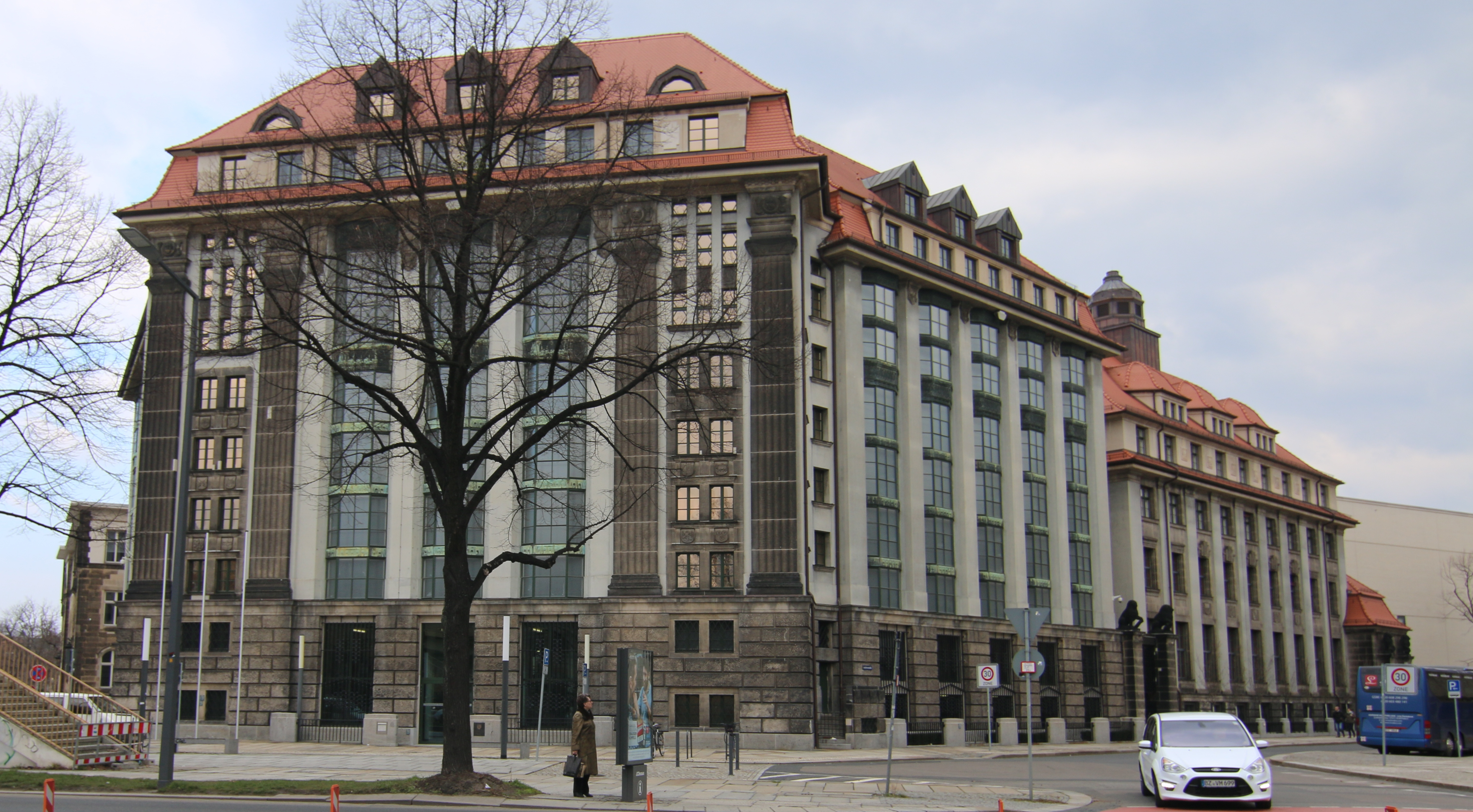 Hauptstaatsarchiv Dresden